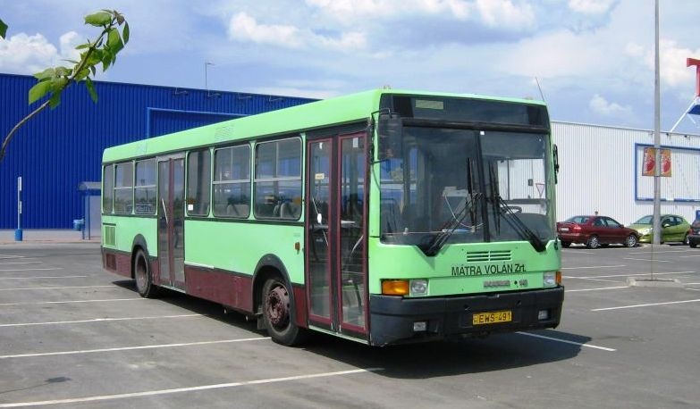 Helyijárat Gyöngyös